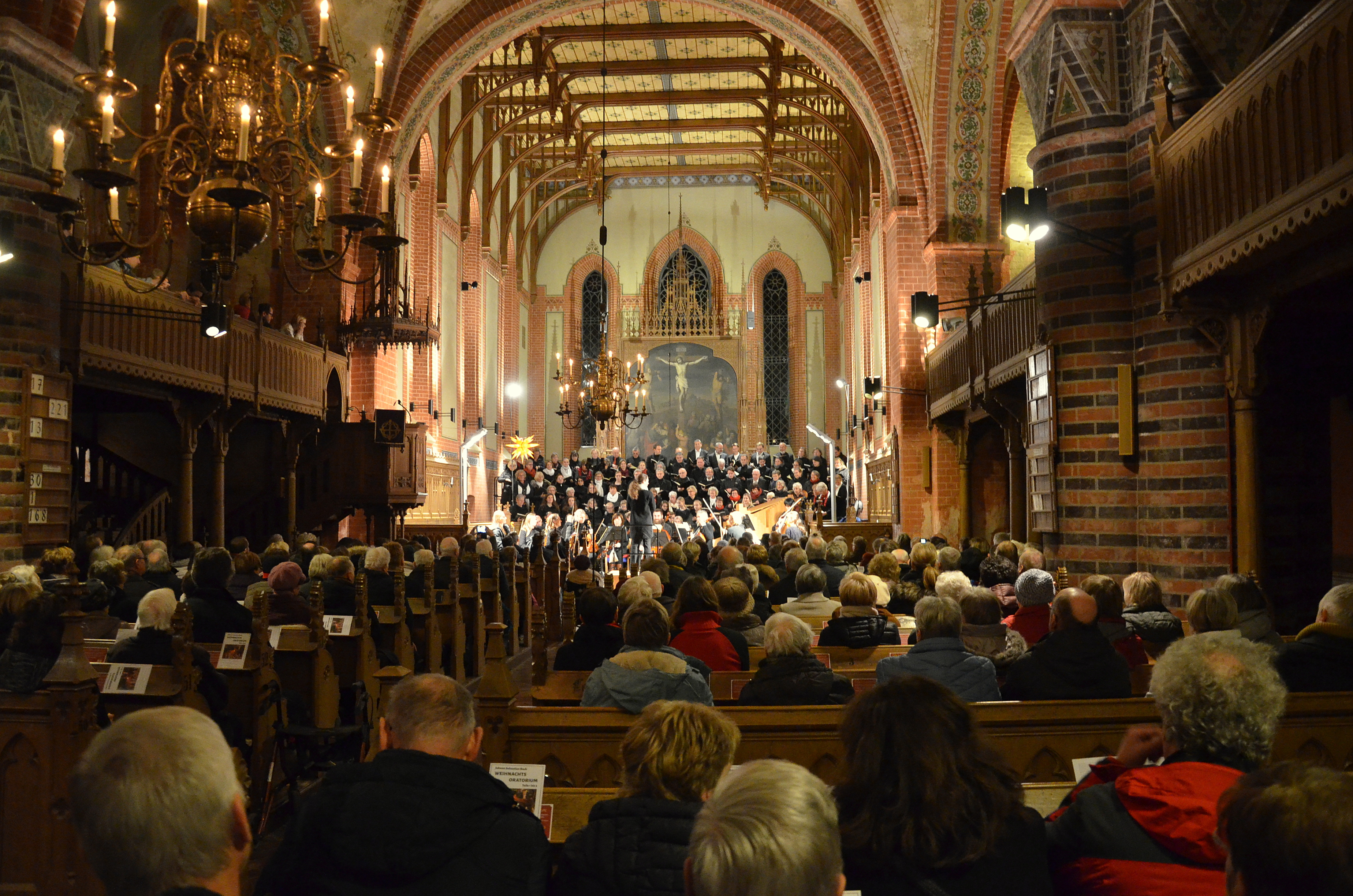 Aufführung von Bachs Weihnachtsoratorium in der Plauer Marienkirche. Unter der Leitung der Plauer Kantorin Katharina Rau und des Kreiskantors Stefan Reißig spielte das Rostocker Kammerorchester. Es sangen der Ökumenische Chor Hagenow, die St. Marien Kantorei Plau am See und der Chorus natalis Rostock. Die Solisten waren Julia Marie Altessini-Kähne (Sopran), Ruth Geigle (Alt), Christian Volkmann (Tenor) und Franz Spenn (Bass).